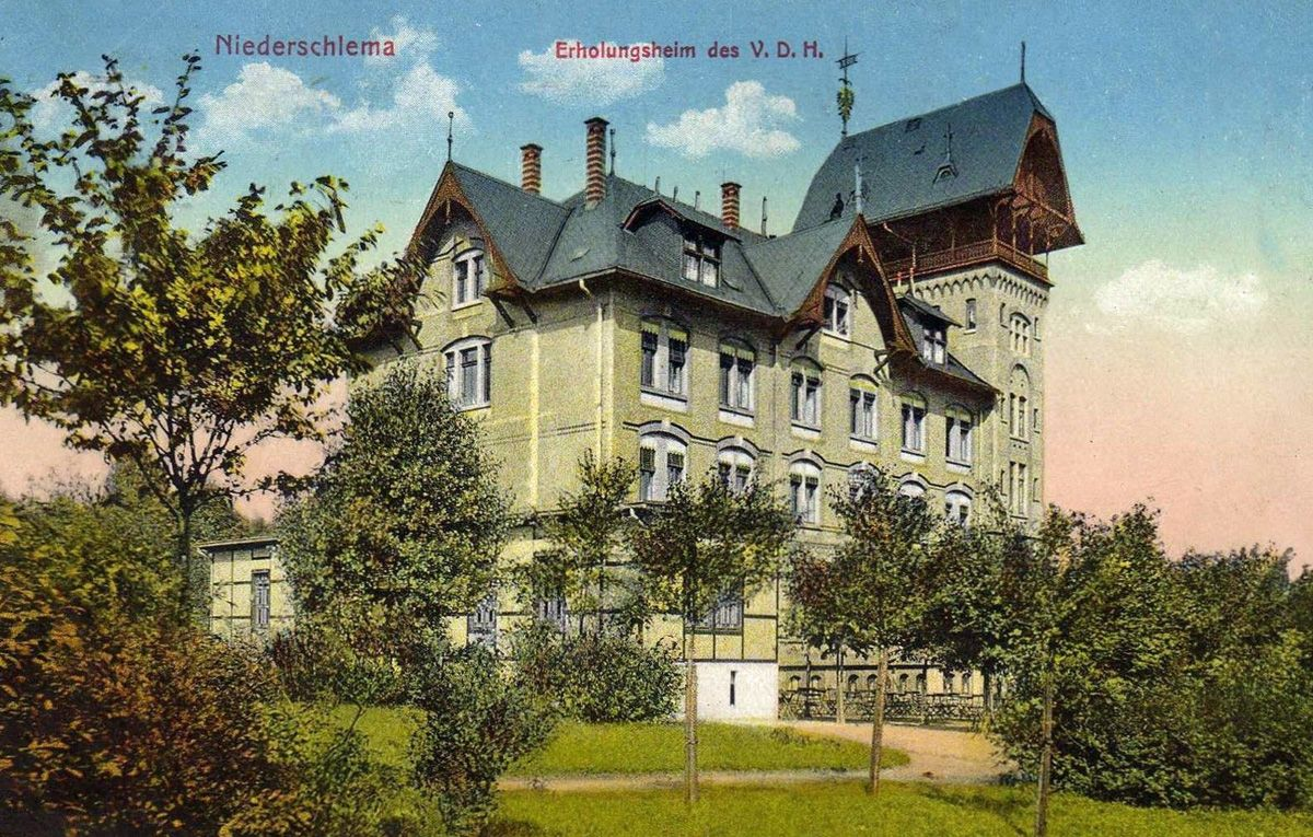 Das Erholungsheim des Verbandes Deutscher Handlungsgehilfen (VDH) in Niederschlema (Erzgebirge) um 1900